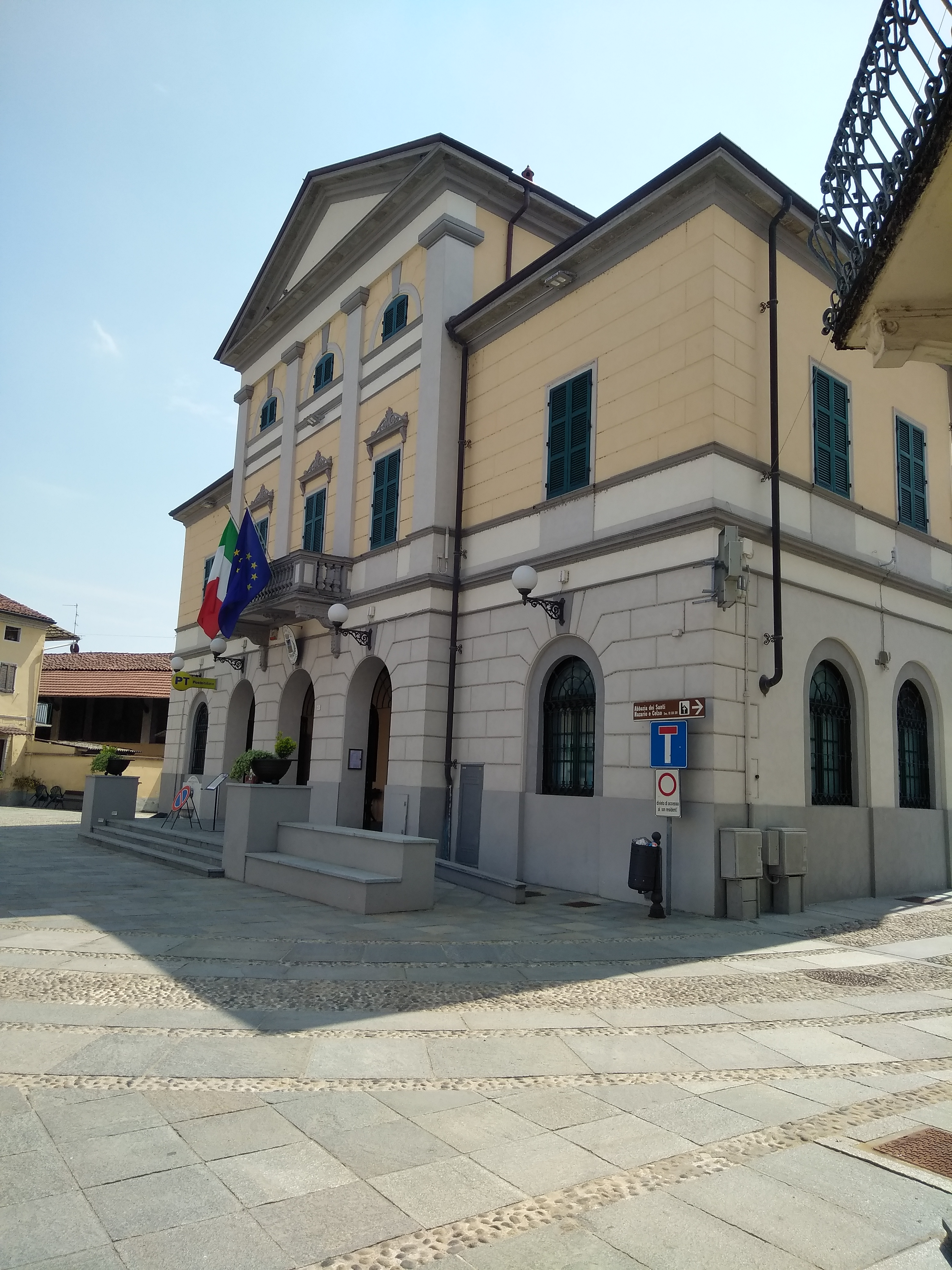 San Nazzaro Sesia (NO): municipio